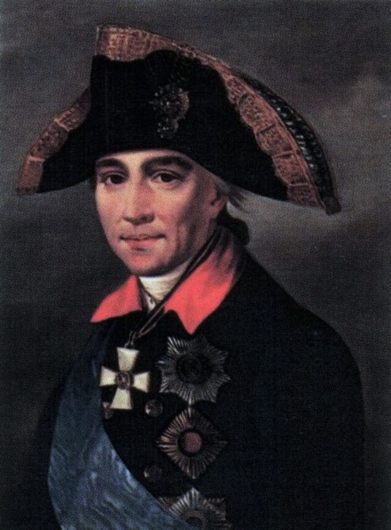 Mikhail Fedotovich Kamensky (1738-1809), russian Field Marshal (from 1797)label QS:Lru,"Михаил Федотович Каменский (1738—1809), русский генерал-фельдмаршал (с 1797). Портрет работы неизв. художника кон. XVIII века. Государственный мемориальный музей им. А. В. Суворова. СПб" label QS:Len,"Mikhail Fedotovich Kamensky (1738-1809), russian Field Marshal (from 1797)"